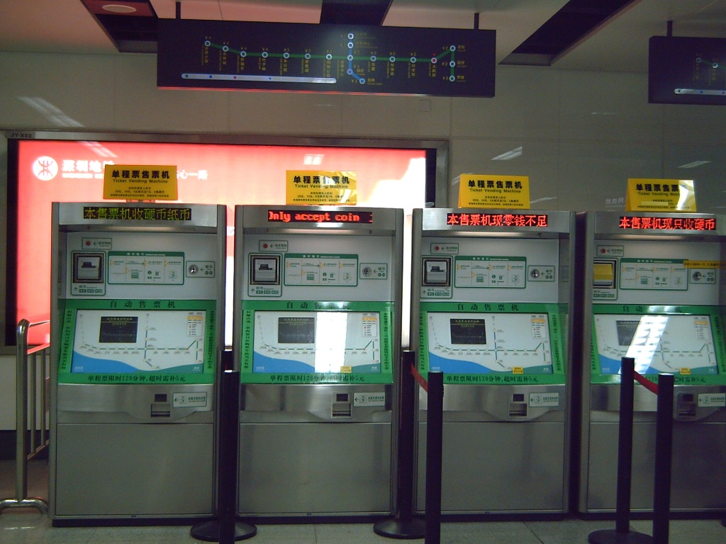 深圳地鐵大劇院站單程票售票機。